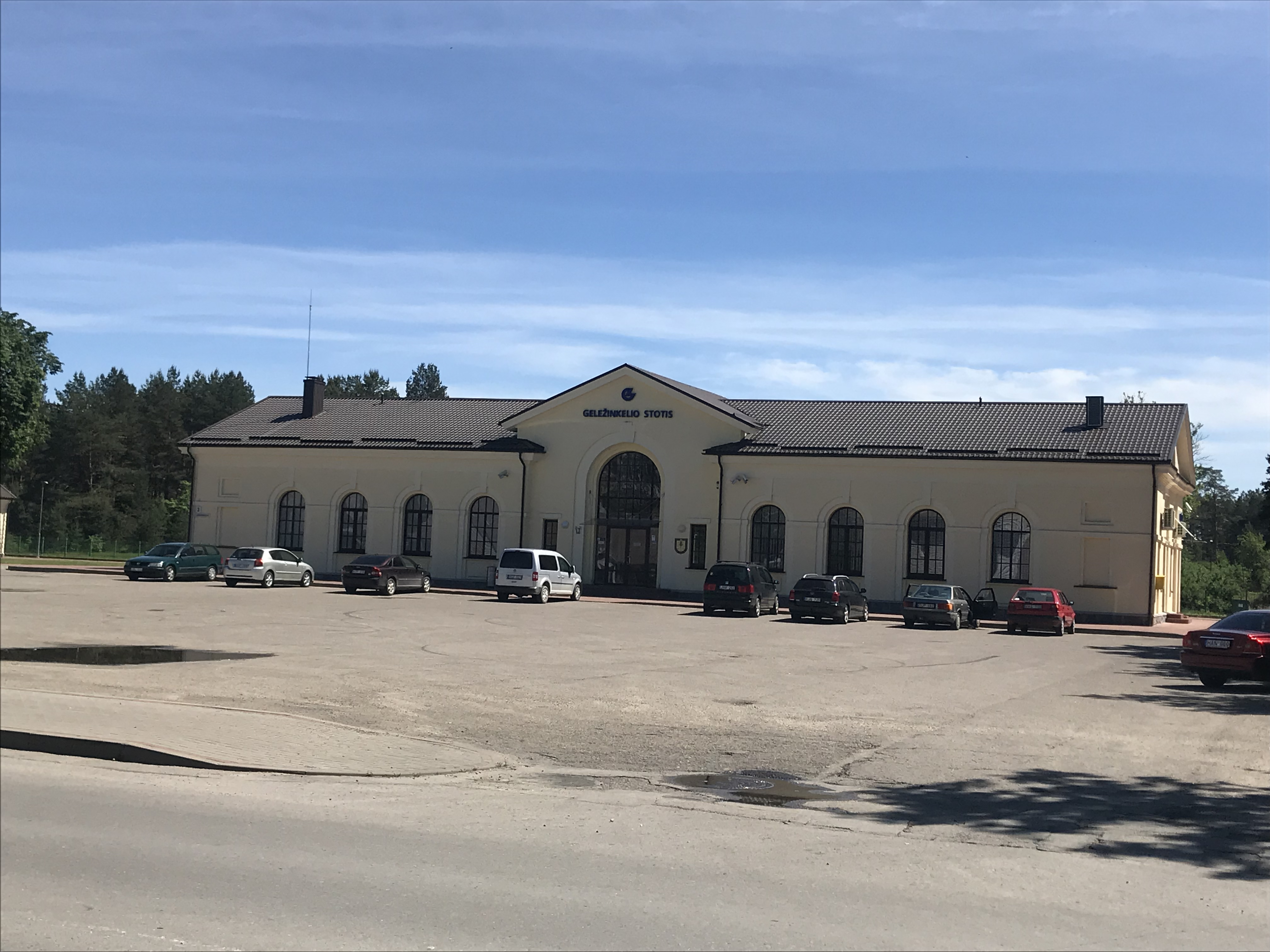 Gefotografeerd tijdens het wandelproject Amsterdam-Moskou